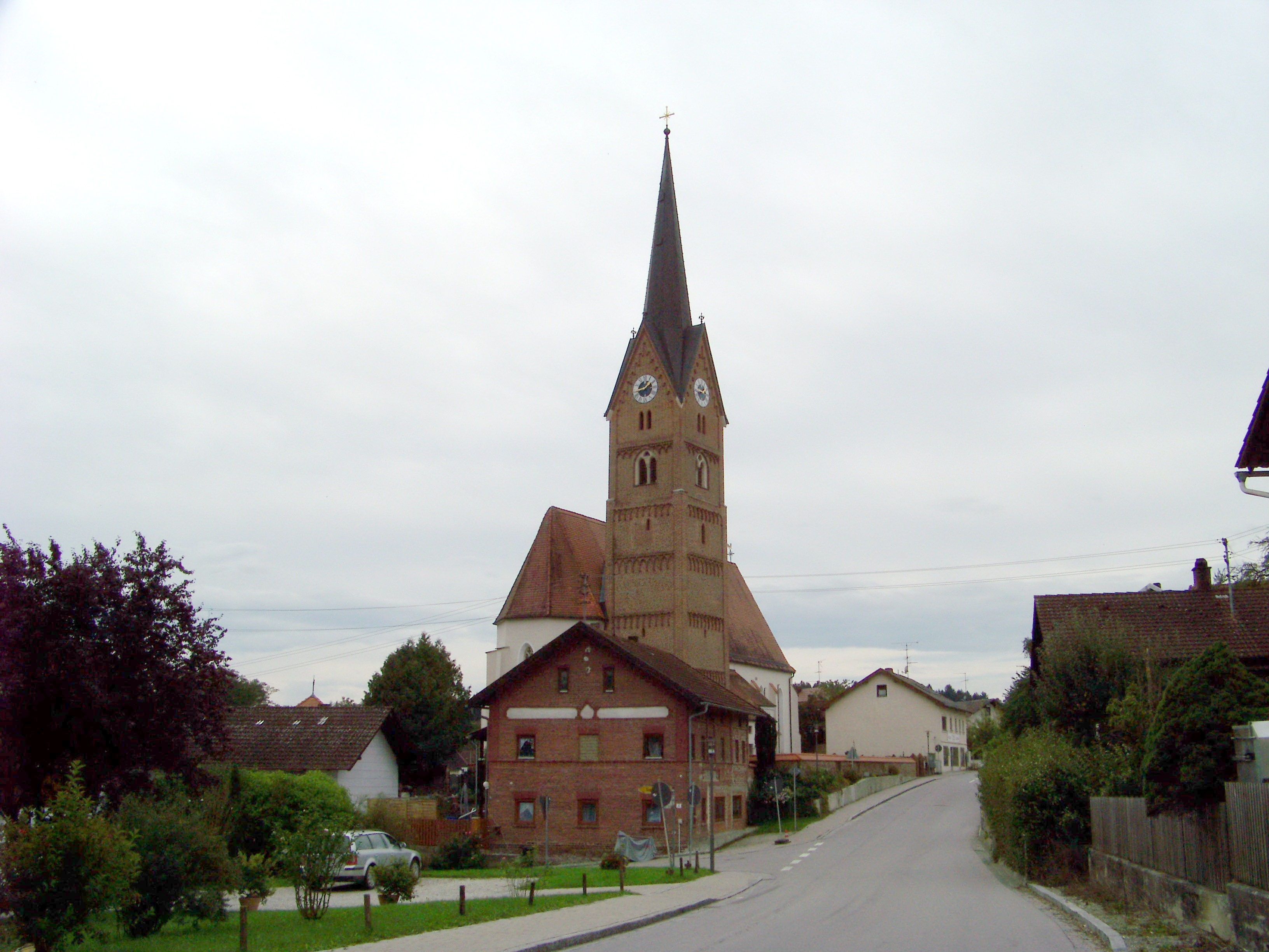 Triftern, Neukirchen, Irlhamer Straße 4. Katholische Pfarrkirche St. Johannes d. Täufer, einschiffiger Gewölbebau, spätgotisch, 2. Hälfte 15. Jahrhundert, Turm des Vorgängerbaus aus dem 13. oder 14. Jahrhundert, modern erhöht, Ausbau der Kirche und Erweiterung nach Westen 1909-11 und 1914; mit Ausstattung.